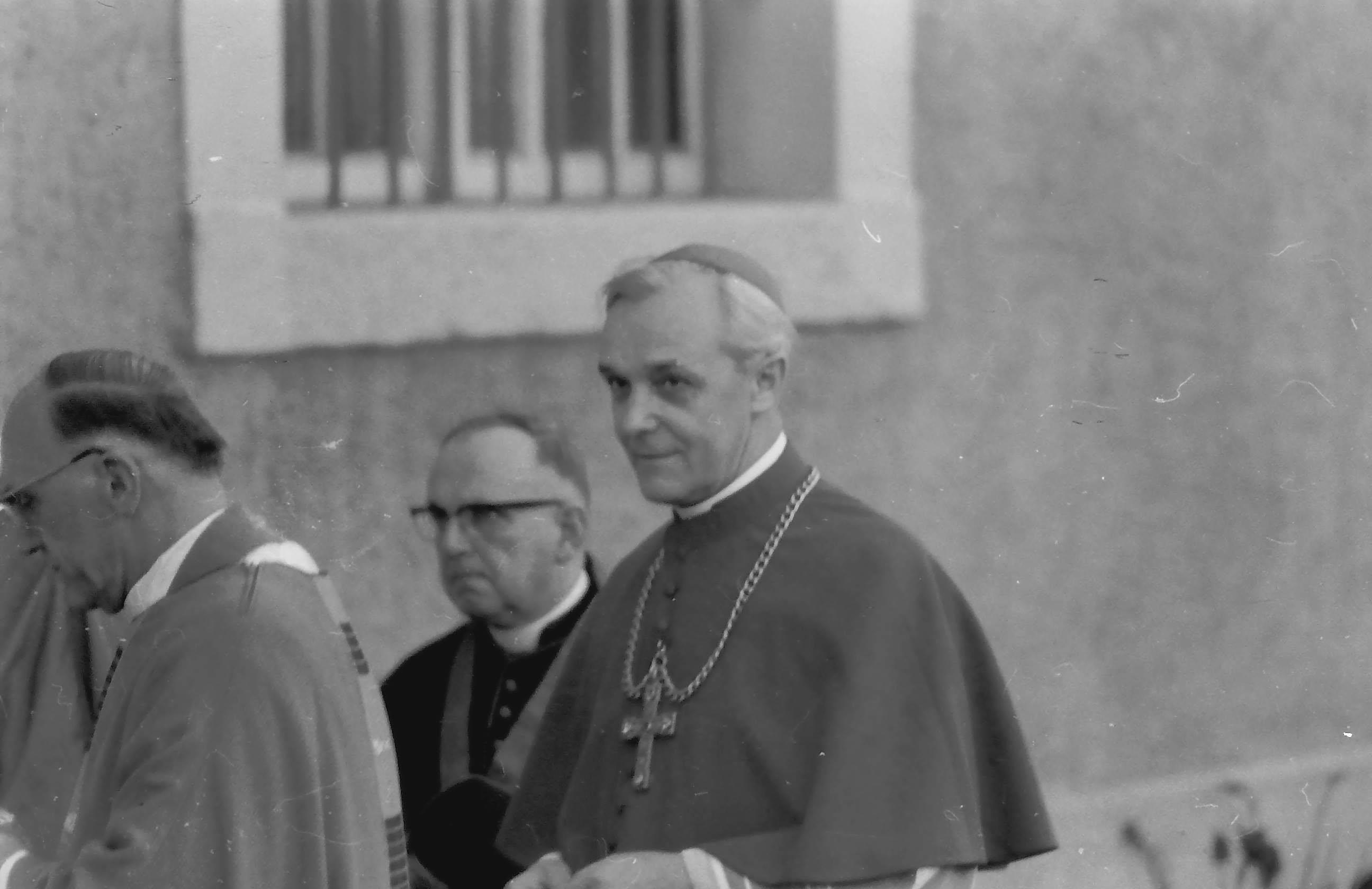 Hornjoserbsce: Wopyt noweho biskopa Schaffrana w Chrósćicach (nowember 1970)